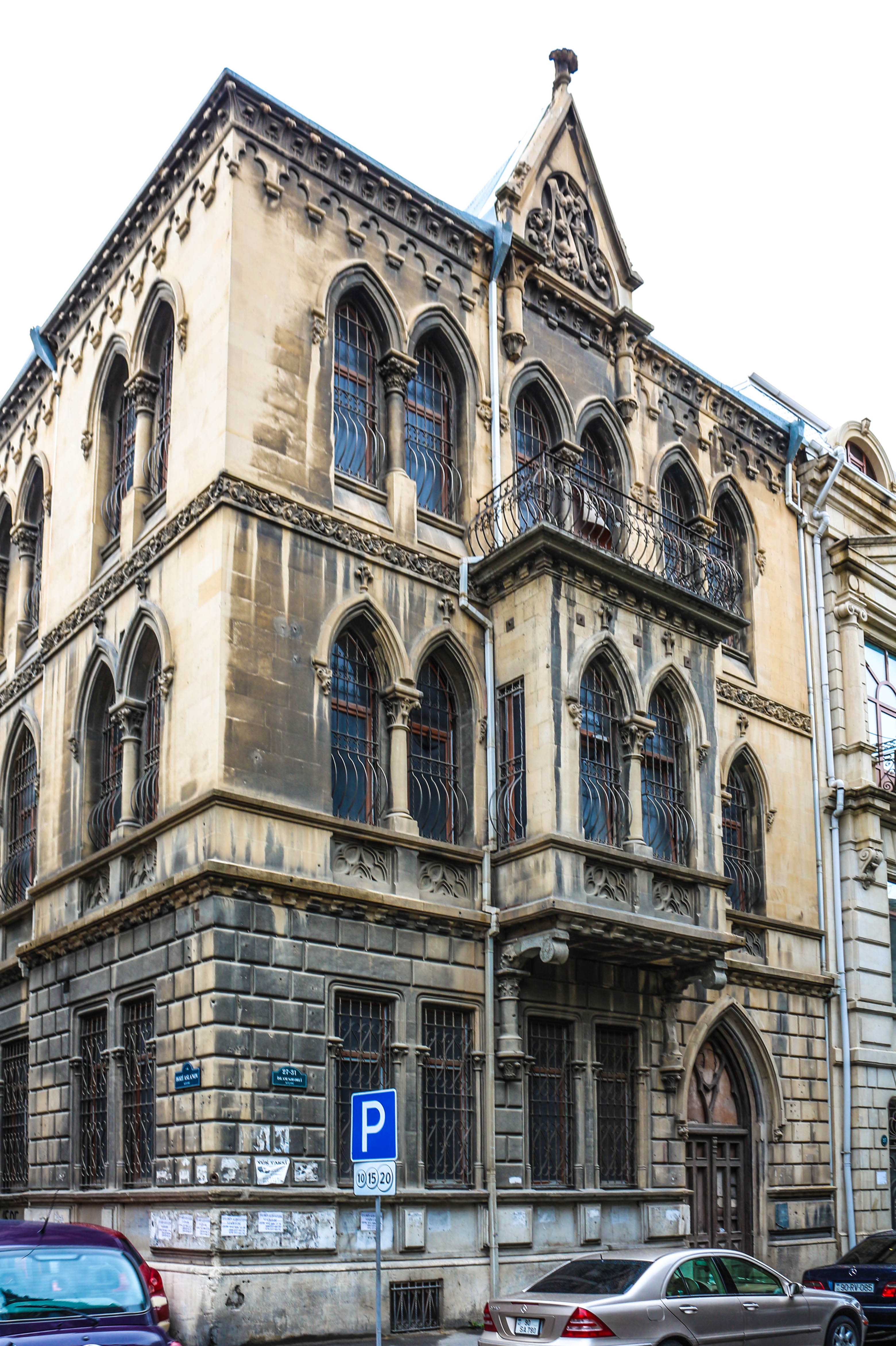 Yaşayış evi, İ.Səfərli küçəsi, 19